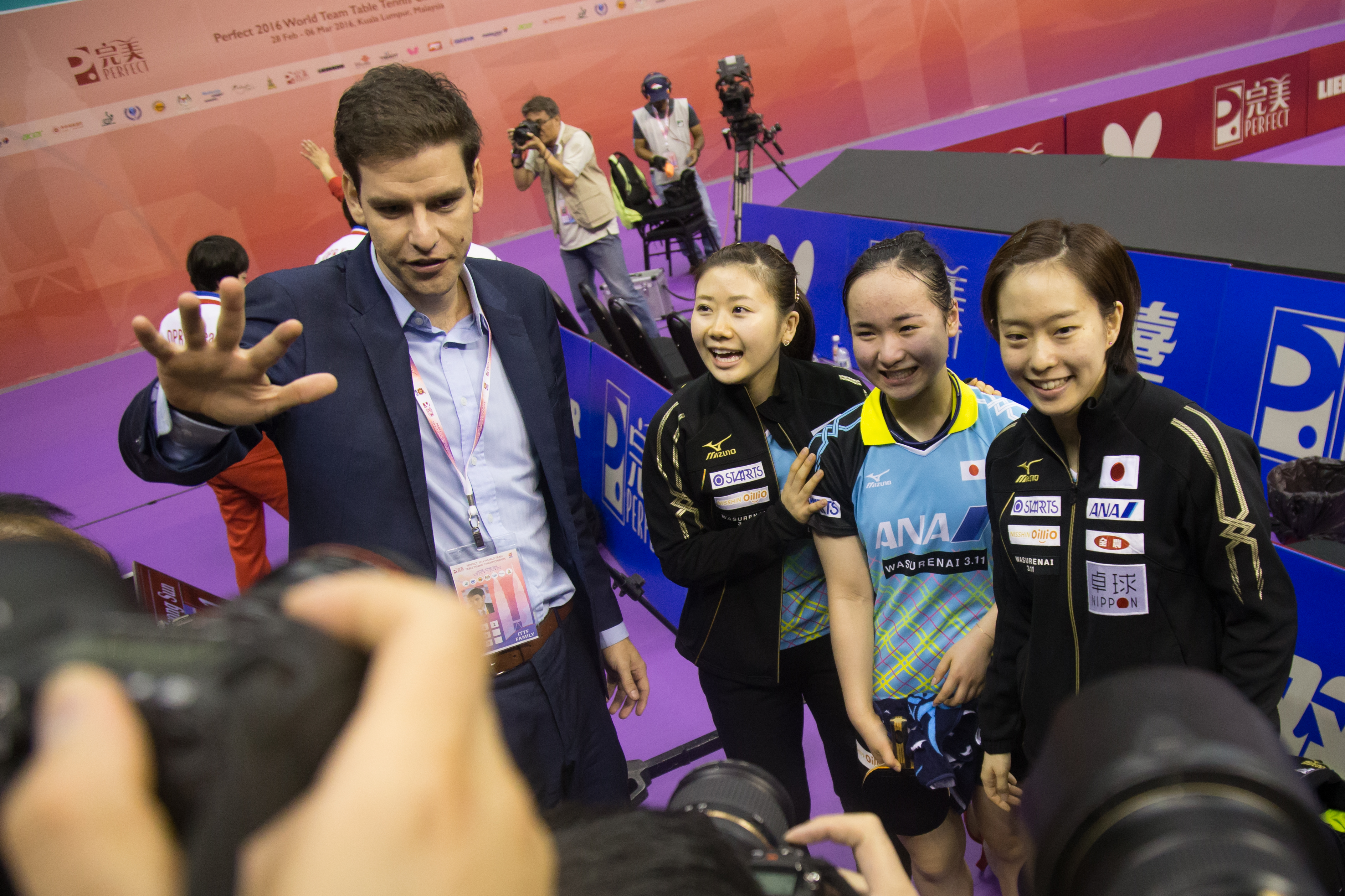 _K0K4476